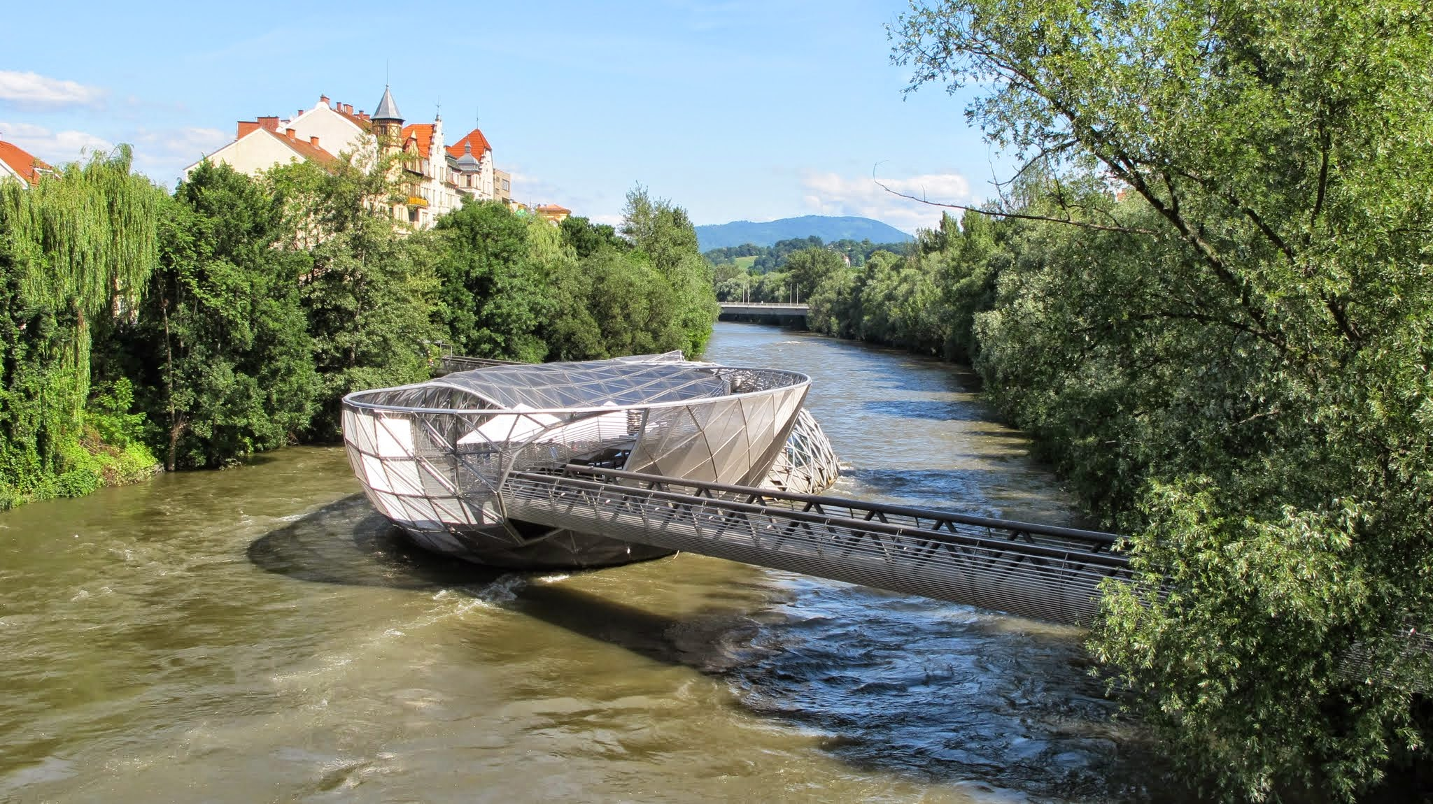 Schloßberg, 8010 Graz, Austria